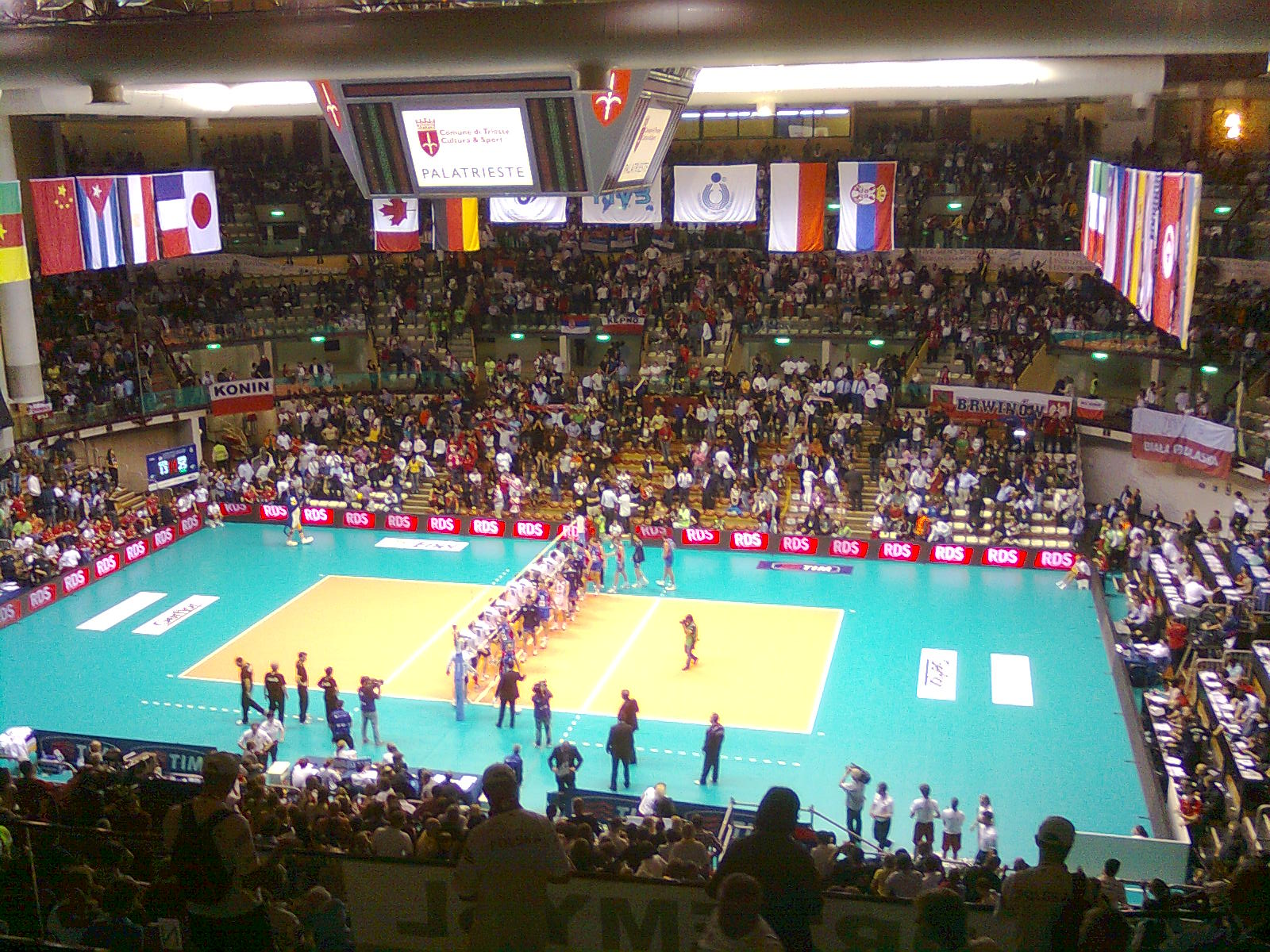 Il PalaTrieste al termine della partita Serbia-Germania dei mondiali di pallavolo 2010